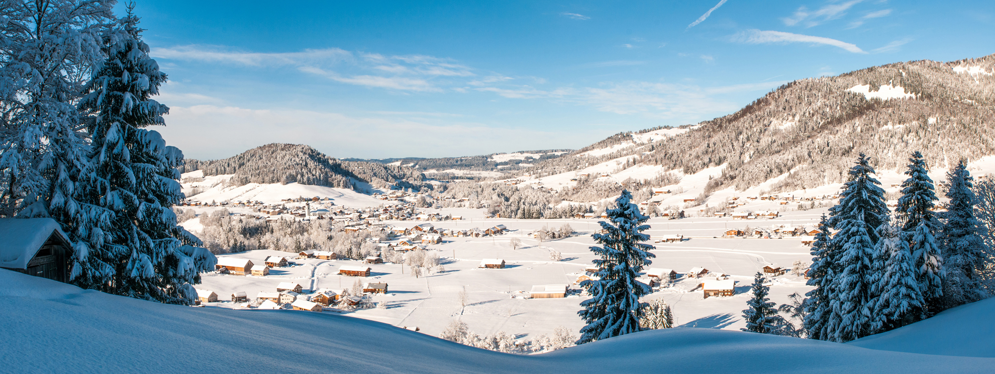 Ortspanorama von Hittisau.